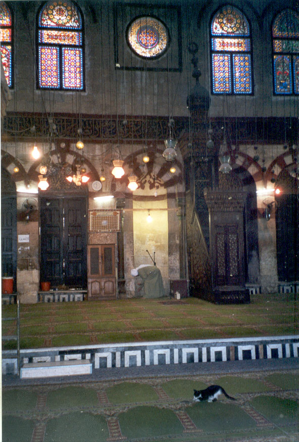 Le Caire : Dans la mosquée du sultan Mamelouk Al-Achraf Sayf ad-Din Qait Bay (1468-1496) construite en 1474